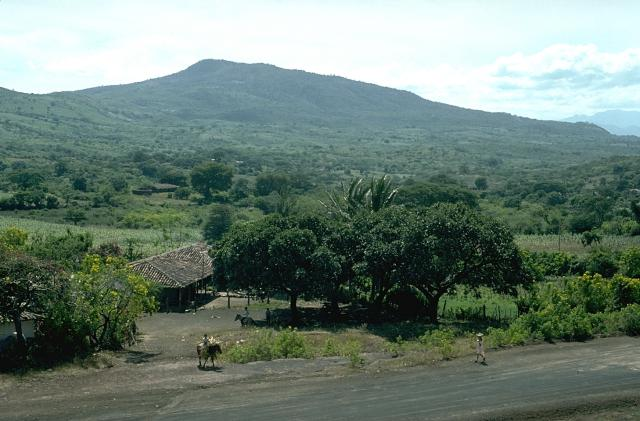 Ixtepeque volcano in Guatemala.